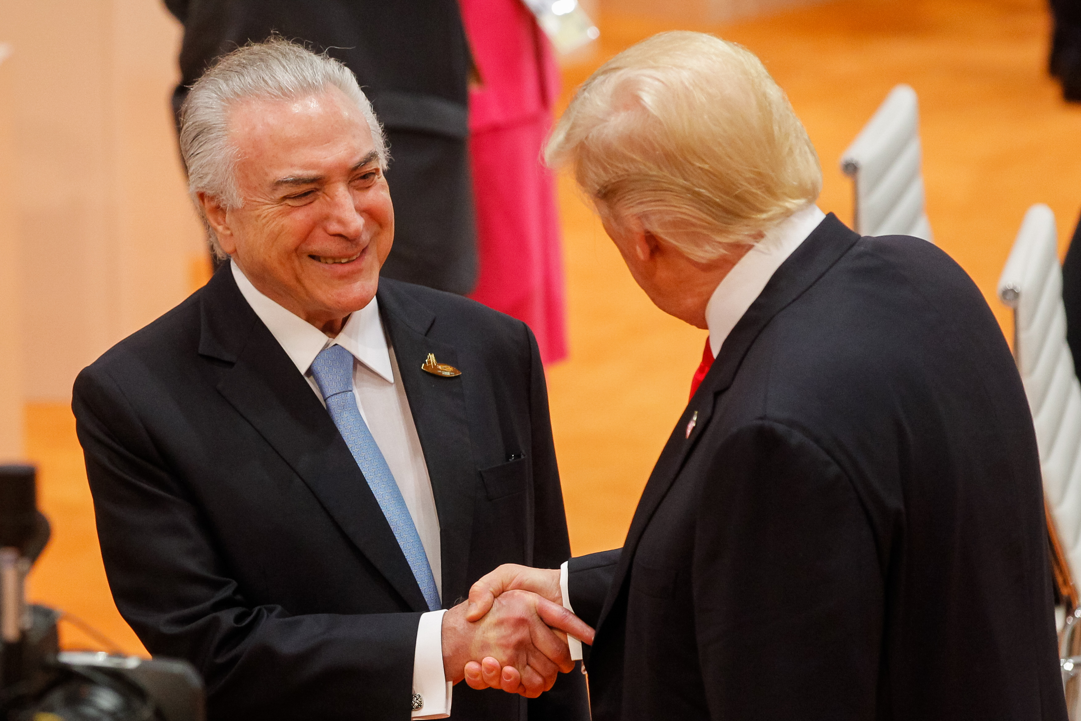 (Hamburgo - Alemanha, 08/07/2017) Terceira Sessão de Trabalho. Foto: Beto Barata/PR